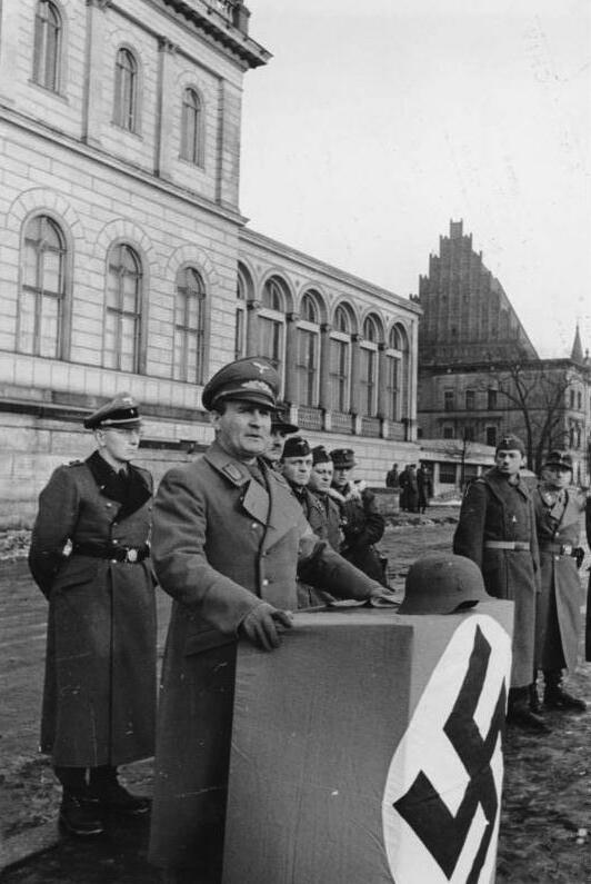 Breslau, Gauleiter Karl Hanke bei Ansprache Breslau Februar 1945 Die ersten Bilder aus der Festung Breslau. Neue Volkssturm-Bataillone der Gauhauptstadt werden vom Gauleiter Hanke vereidigt. In den nächsten Stunden bereits werden diese seit Wochen ausgebildeten Männer zu ihren Kameraden treten, die die Verteidigung der Heimatstadt übernommen haben. Gauleiter Hanke bei seiner Ansprache. SS-PK Mitschke [Breslau.- Gauleiter Karl Hanke bei Ansprache am Rednerpult mit Hakenkreuz-Flagge und Stahlhelm] Abgebildete Personen: Hanke, Karl: Staatssekretär, Gauleiter und Oberpräsident von Niederschlesien, Deutschland (GND 130339490) Information added by Wikimedia users.